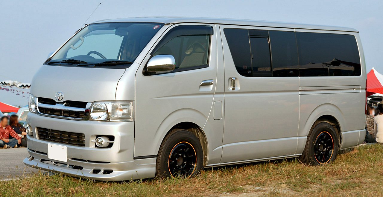 Toyota Hiace Long van Super GL 2.5 turbo-diesel